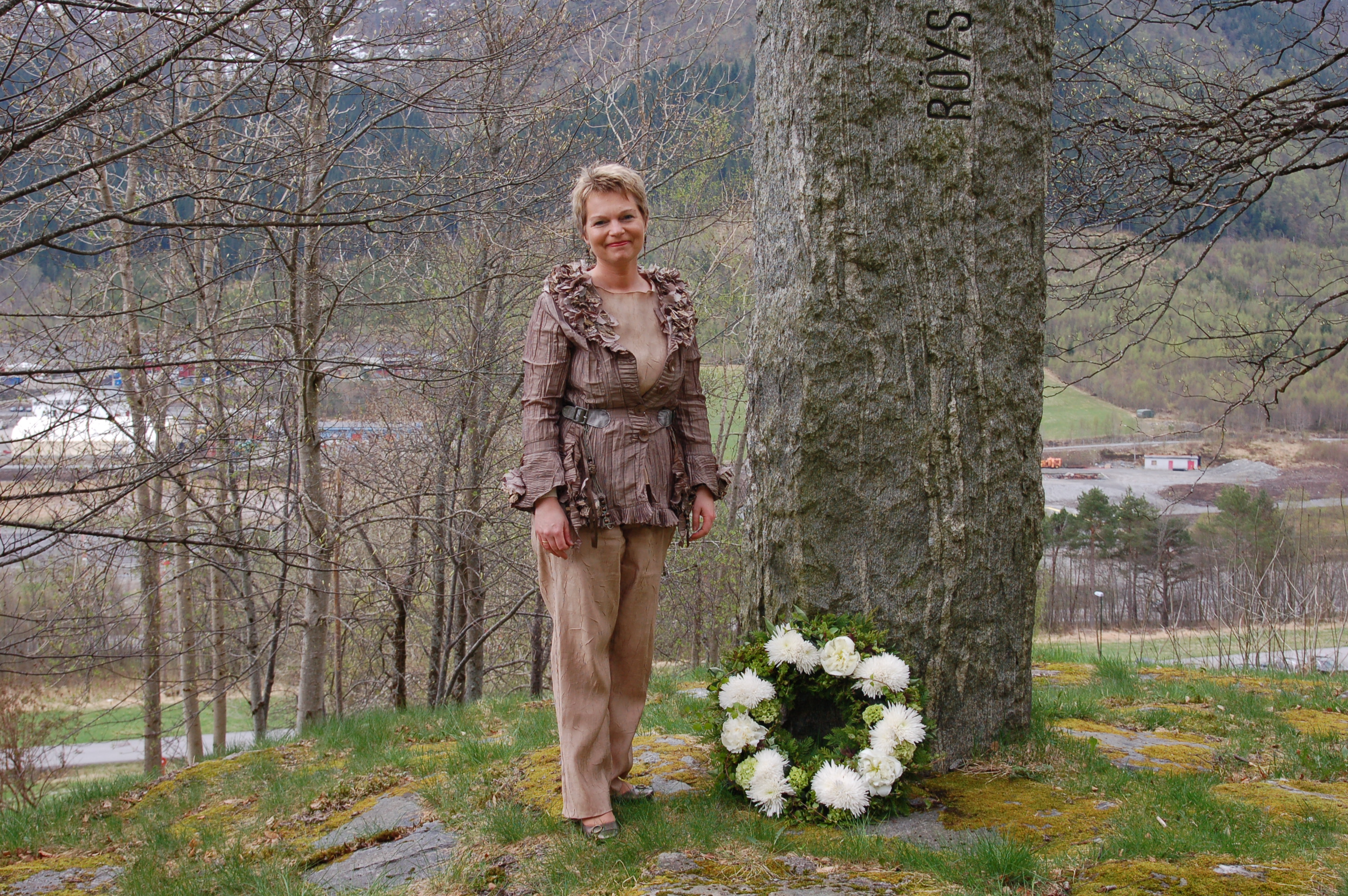 Leiar i kulturkomiteen på Stortinget, May Helen Molvær Grimstad, la ned kransen ved bautane for Ivar Aasens verk i den gamle delen av Aasen-tunet.